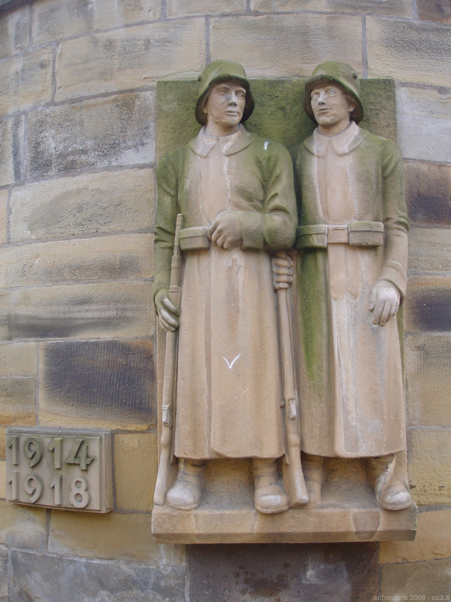 Kriegerdenkmal bei der Peterskirche in Heilbronn-Neckargartach